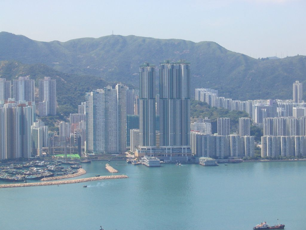 西灣河 Sai Wan Ho